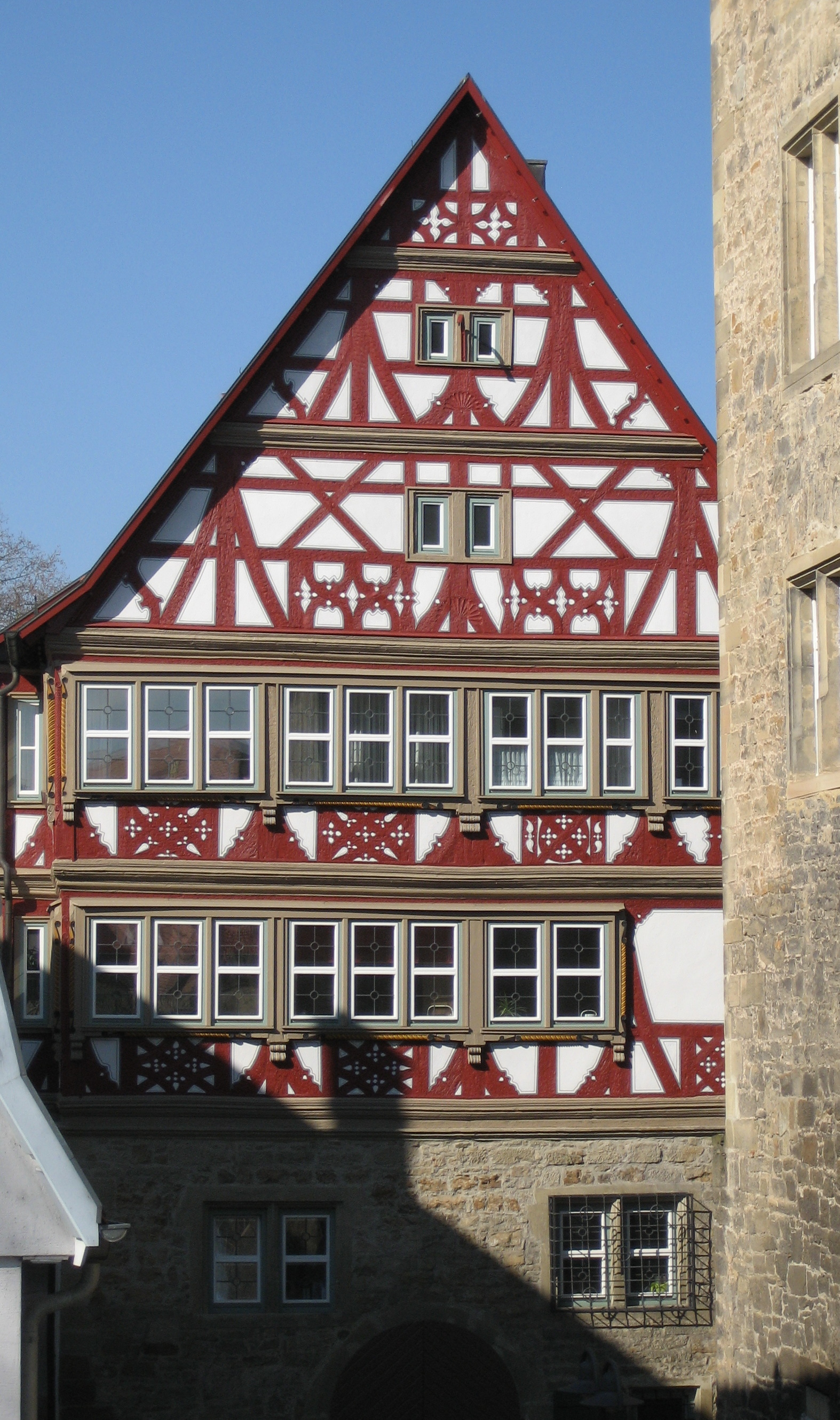 Öhringen Marktplatz